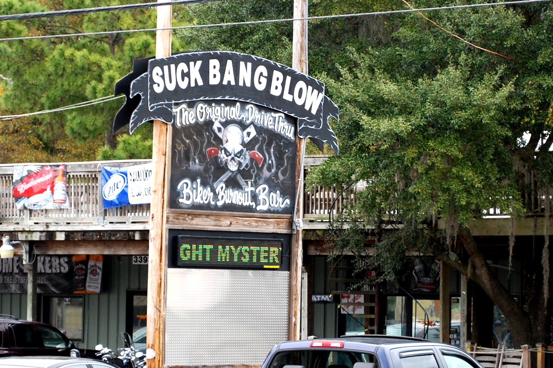 Suck Bang Blow biker bar in Murrell's Inlet, SC